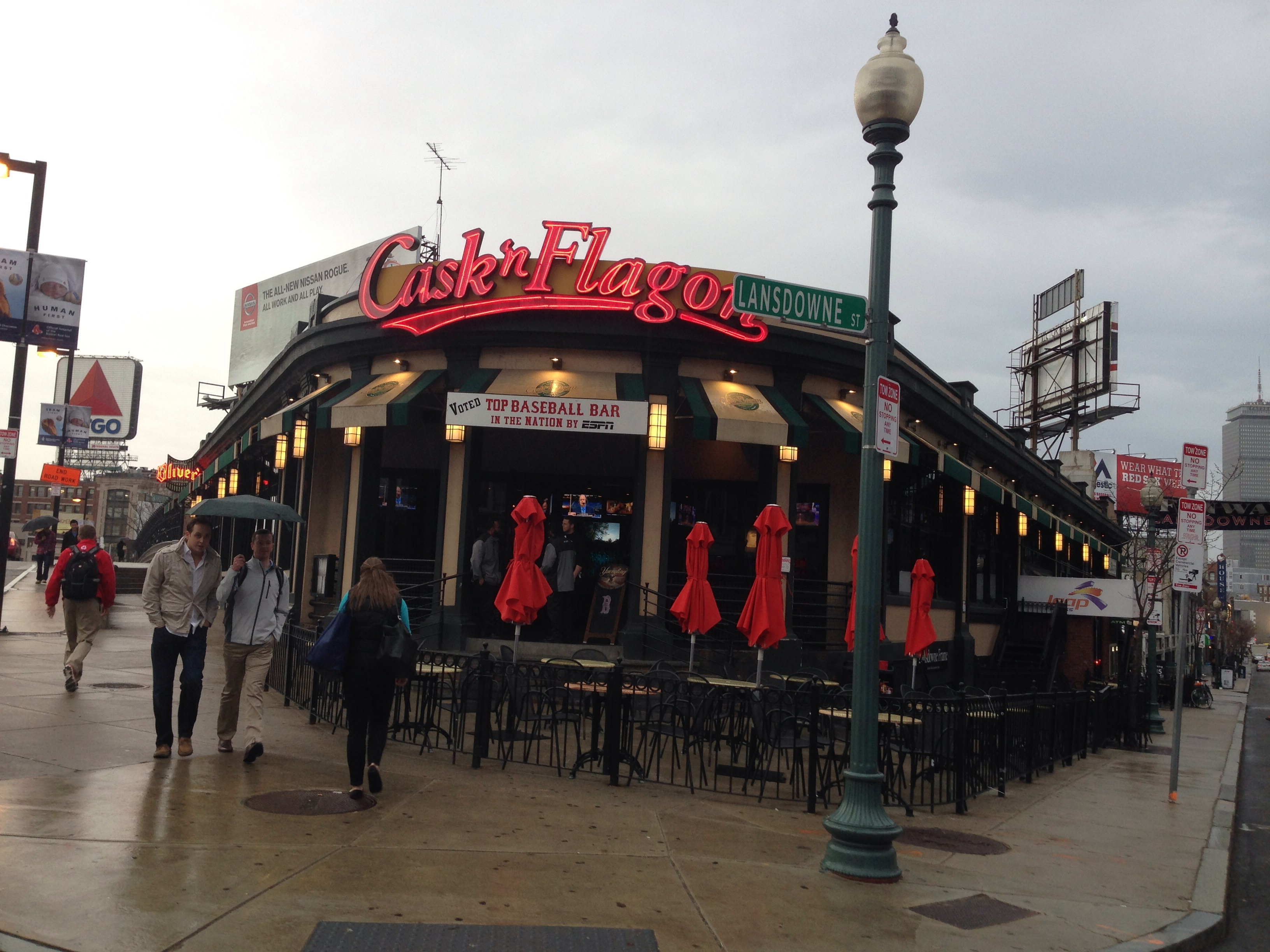 Cask n flagn